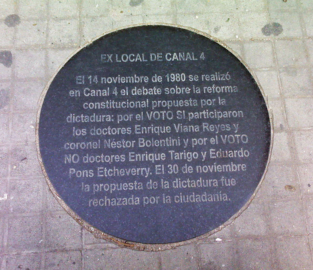 Marca de la memoria frente al exlocal de Monte Carlo TV Canal 4 (Montevideo)